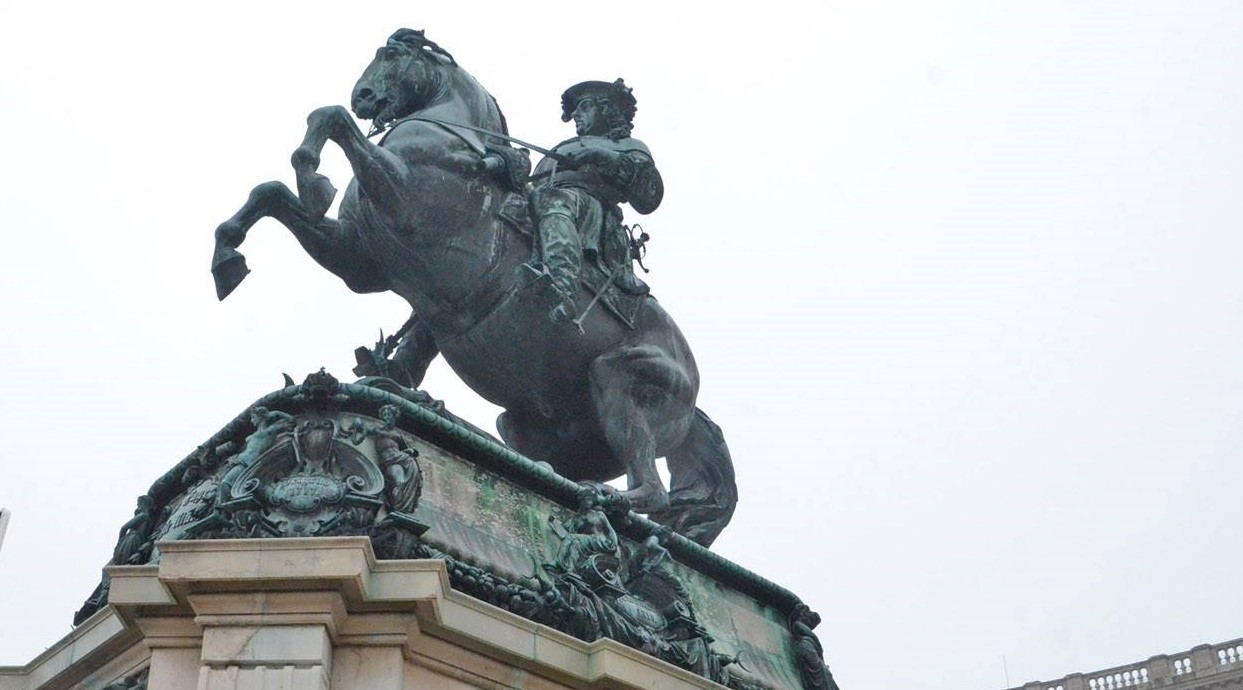 Na postamentu spomenika je ispisano ime Petrovaradina (Peterwardein) i godina pobede nad osmanskom vojskom "1716"